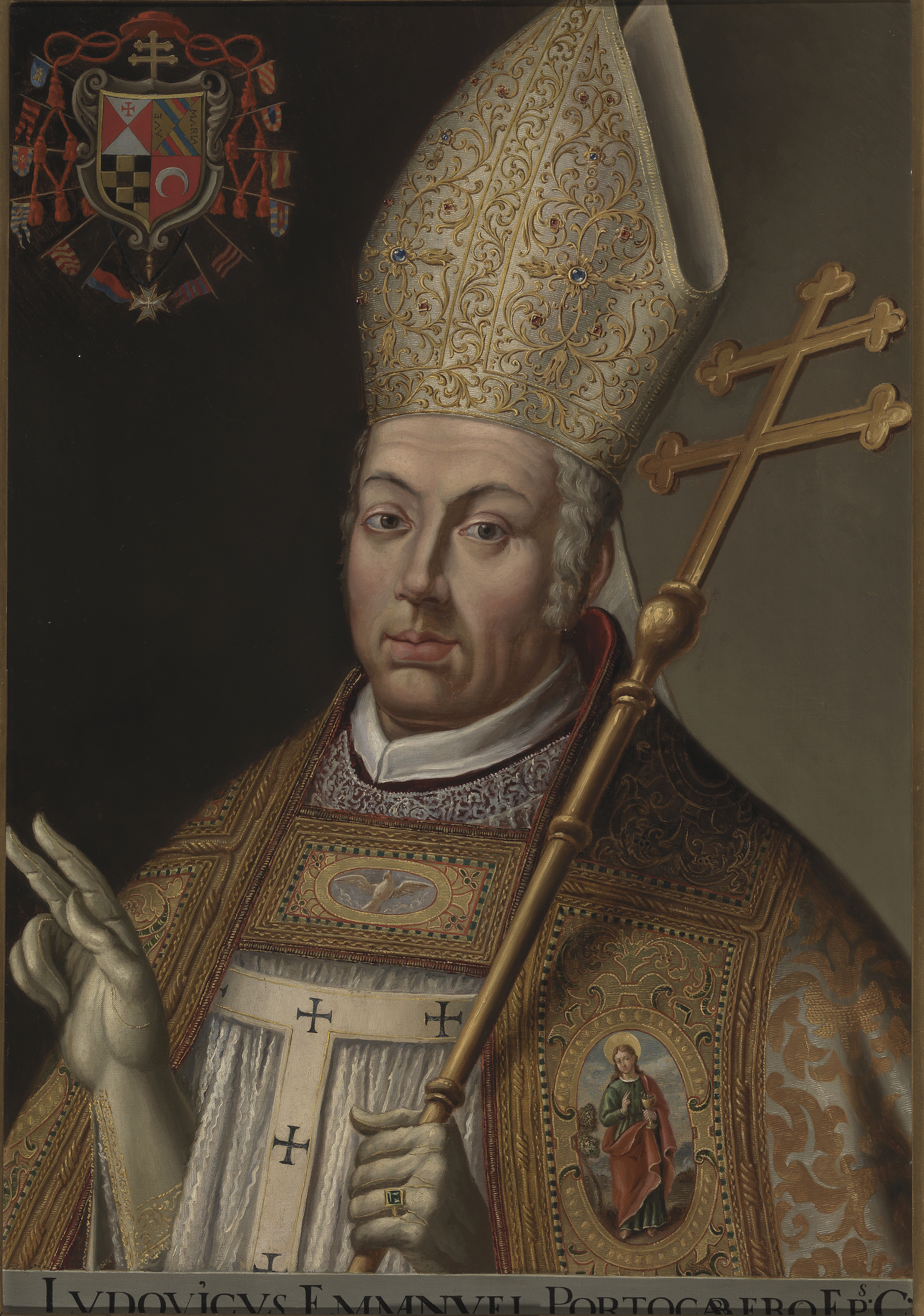 Retrato del eclesiástico español Luis Fernández de Portocarrero (1635-1709), que llegó virrey interino de Sicilia en 1677, arzobispo de Toledo y consejero de Estado durante el reinado de Carlos II de España. Estuvo a cargo del gobierno de España durante la agonía del rey Carlos II como valido, lugarteniente y gobernador del Reino y durante la ausencia del rey Felipe V de España por la Guerra de Sucesión Española como gobernador del Reino. Esta obra es una copia decimonónica del retrato del arzobispo conservado en la Sala capitular de la catedral de Toledo.